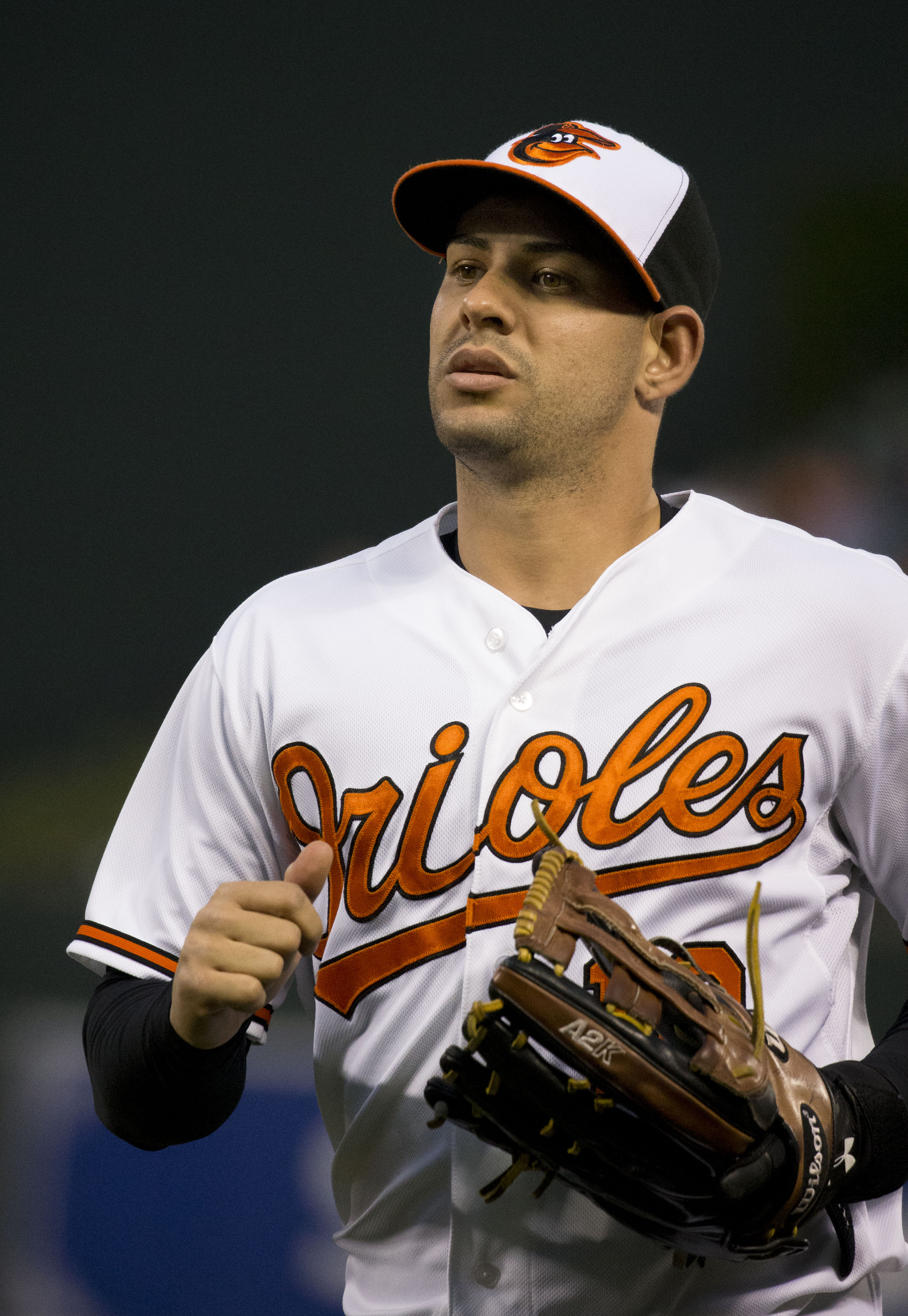 Dariel Álvarez